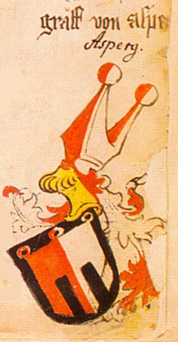 Ingeram-Codex der ehemaligen Bibliothek Cotta graff von asperg freigestellt aus